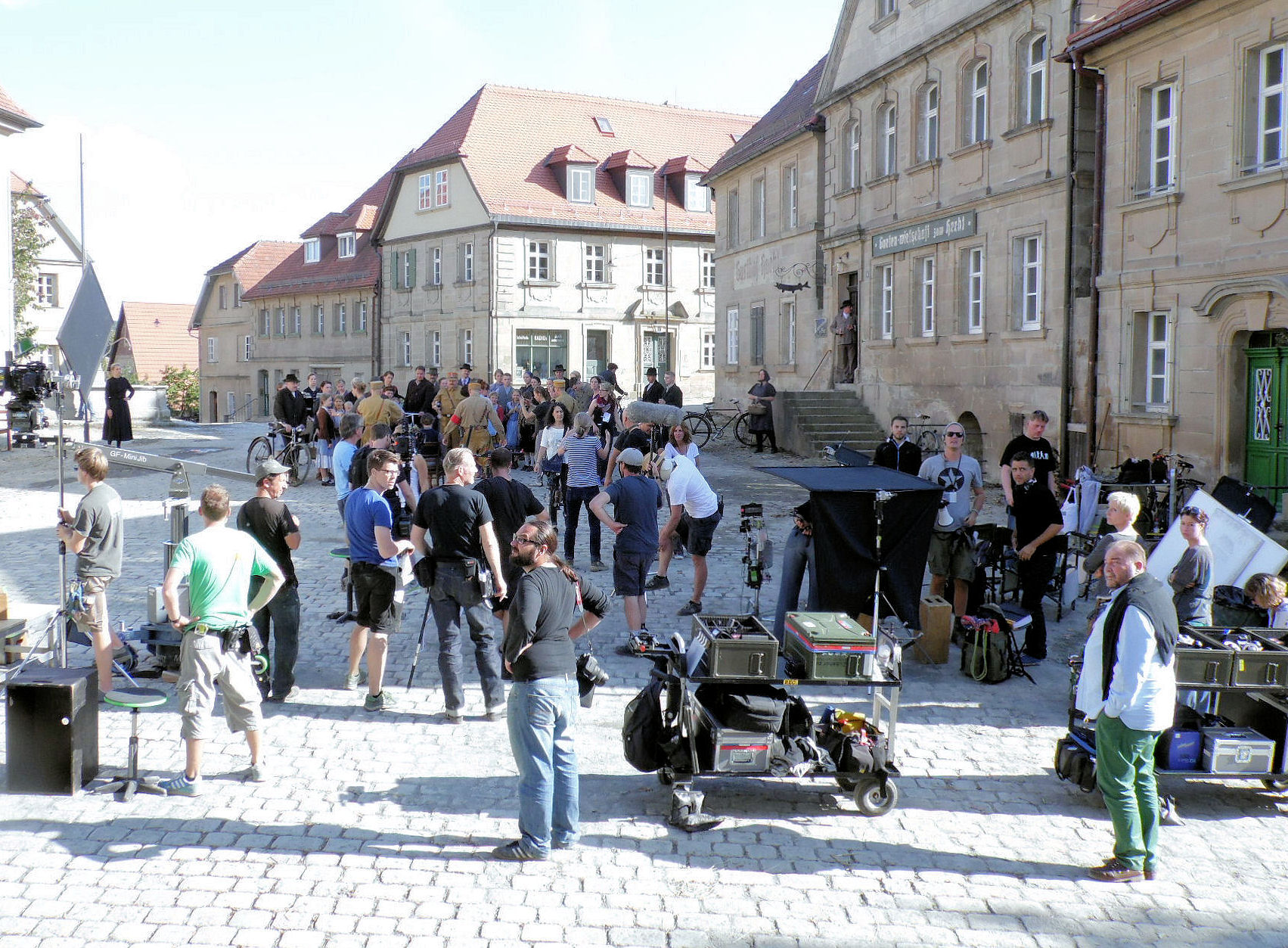 Filmarbeiten am Rathausplatz von Weidenberg, Oberfranken